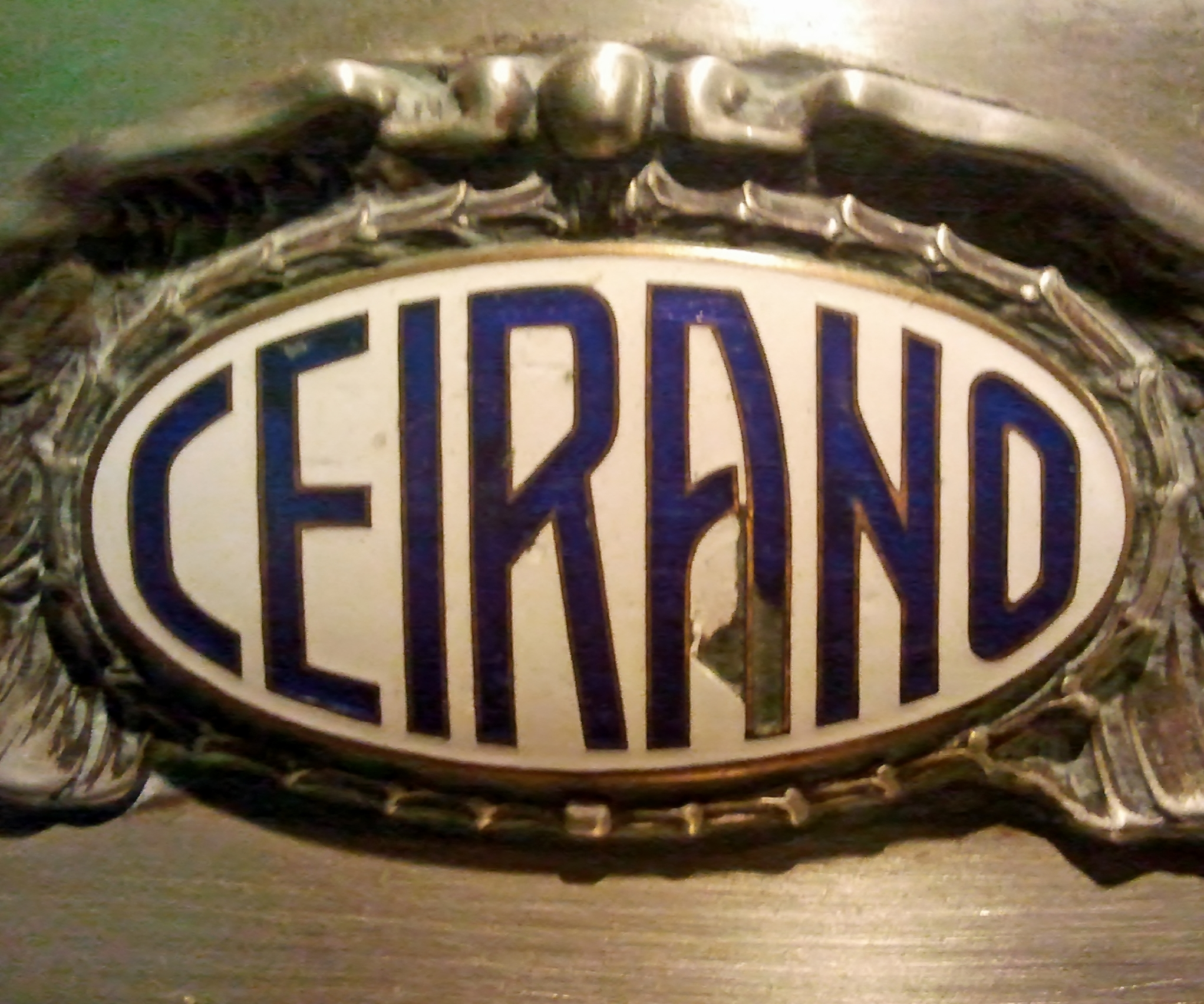 Ceirano logotype